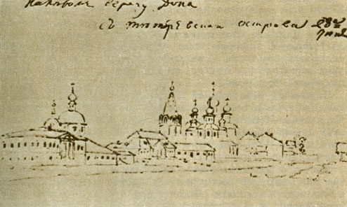 Эскиз (рисунок) архитектора Н. А. Львова станицы Черкасской (Старочеркасск), 1803 год.